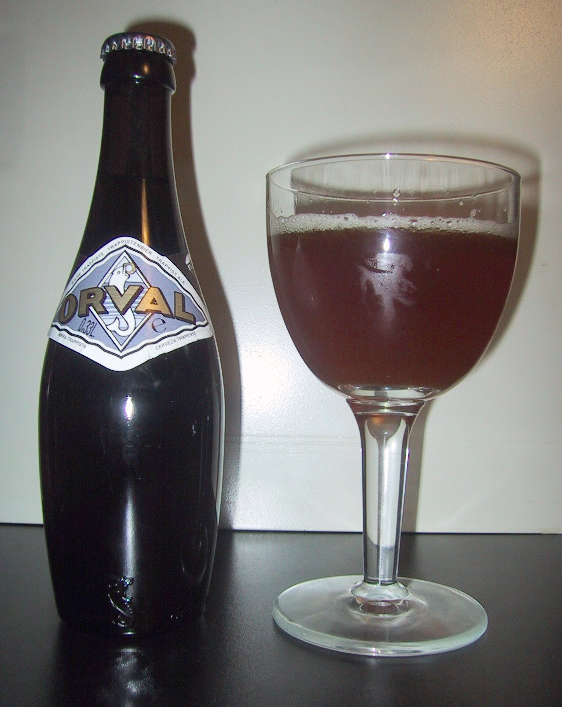 Orval trappist beer (Belgium).